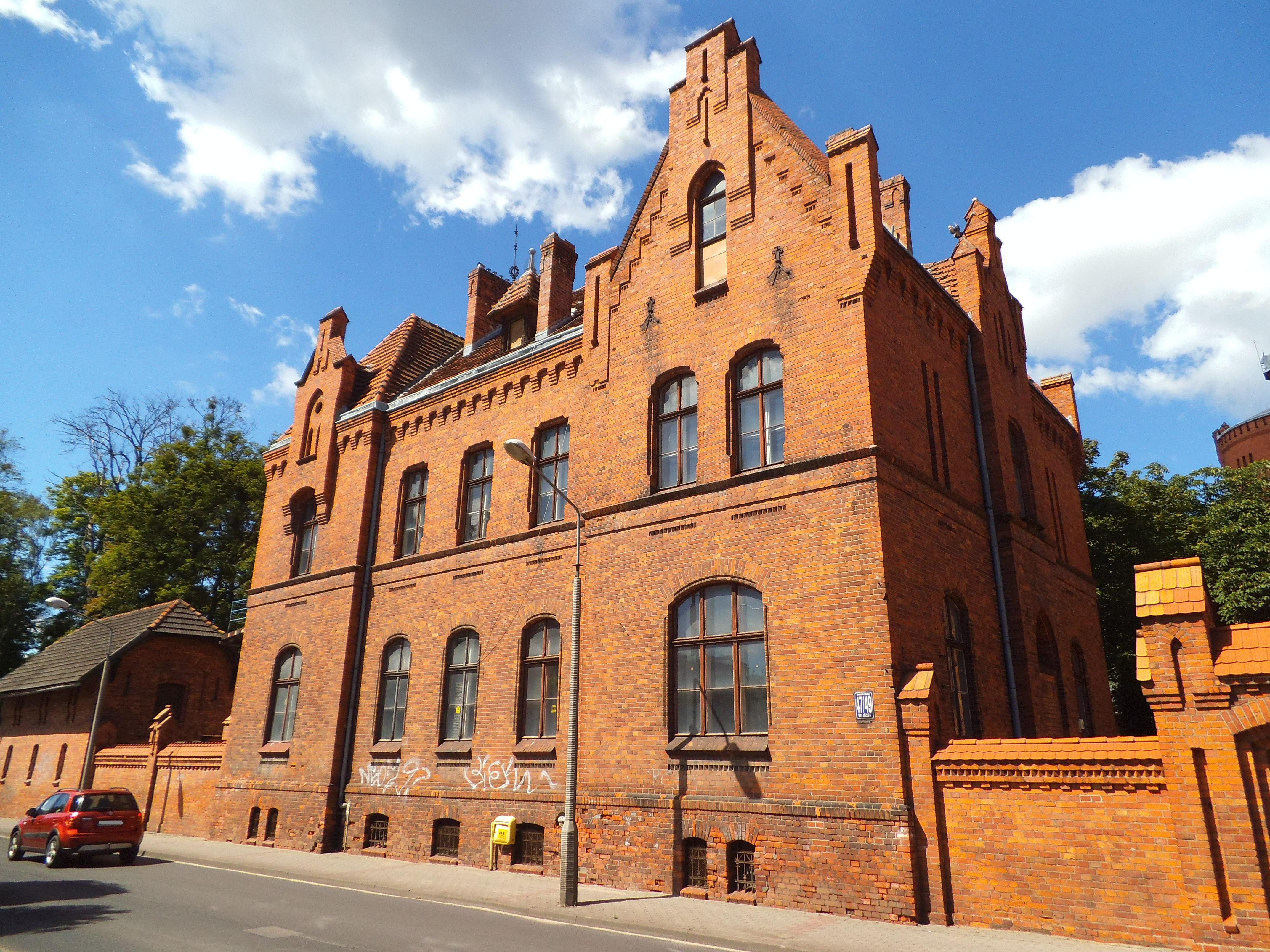 Toruńskie Wodociągi